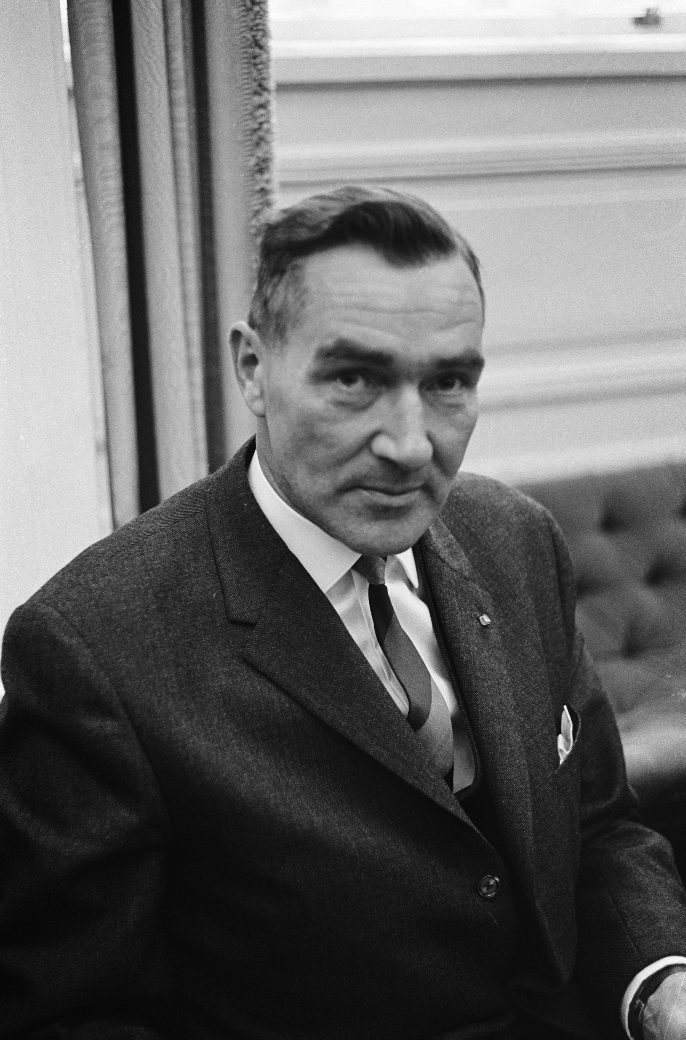 Collectie / Archief : Fotocollectie Anefo Reportage / Serie : [ onbekend ] Beschrijving : Staatssecretaris van Defensie Haex Datum : 1 oktober 1963 Locatie : Den Haag, Zuid-Holland Trefwoorden : portretten, staatssecretarissen Persoonsnaam : Haex, J.C.E. Fotograaf : Pot, Harry / Anefo Auteursrechthebbende : Nationaal Archief Materiaalsoort : Negatief (zwart/wit) Nummer archiefinventaris : bekijk toegang 2.24.01.05 Bestanddeelnummer : 915-5885